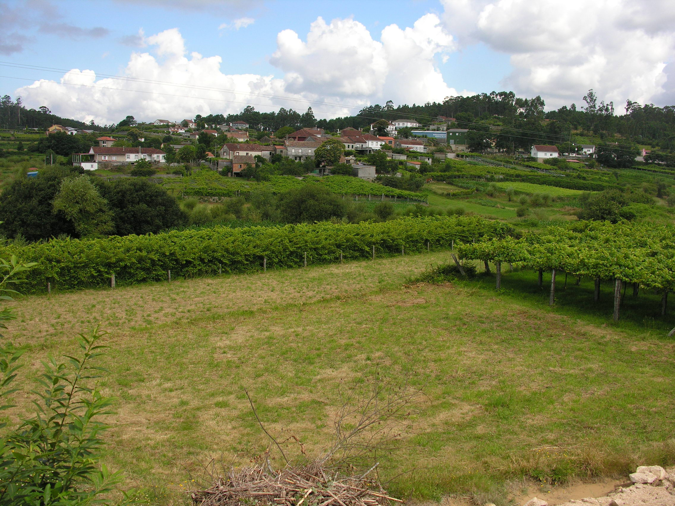 Paisaxe en Moraña, Galicia Publish by= Luis Miguel Bugallo Sánchez.